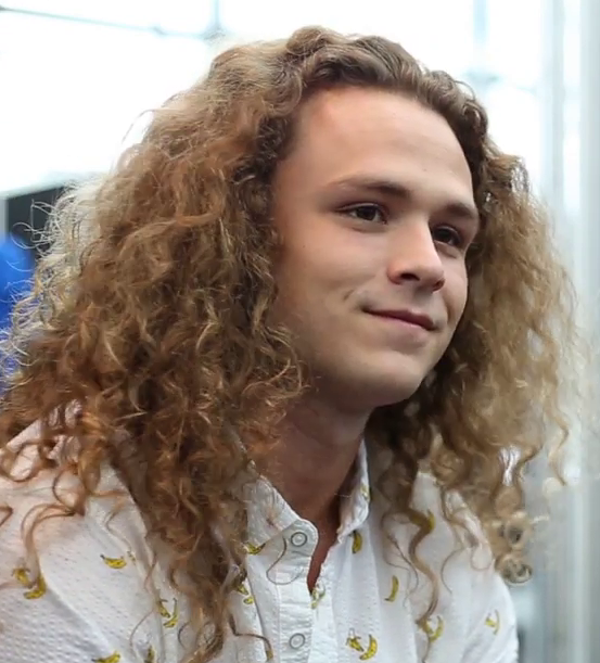 Jungle Boy lors du New York Comic Con le 4 octobre 2019 dans une interview organisée par AEW On TNT